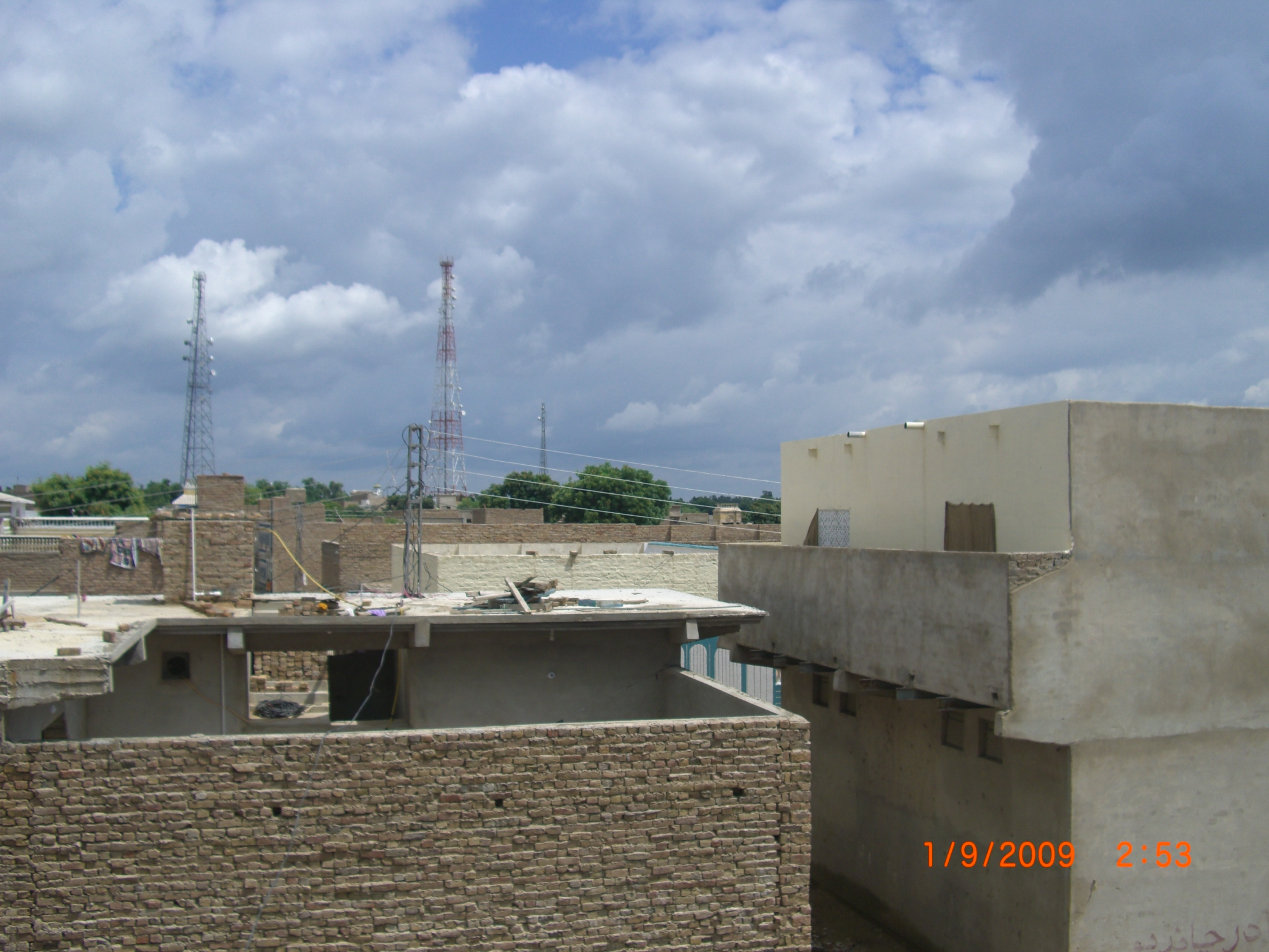 View From Our House Sakrand